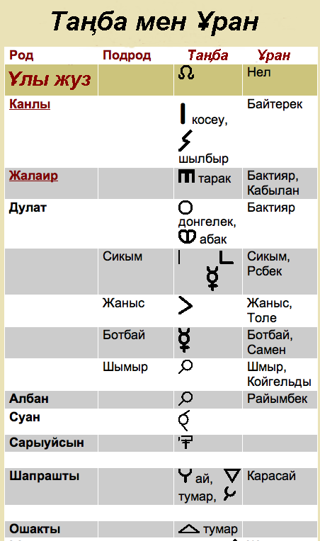 Қазақша (кирил): Таңба мен Ұран